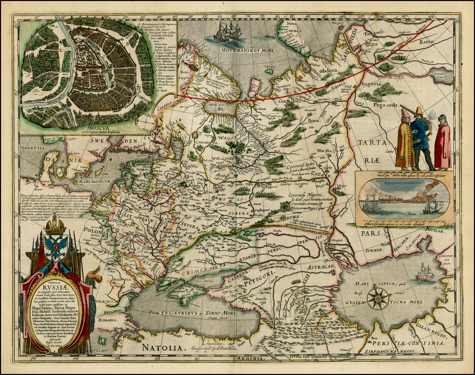 Карта Московии Гесселя Герритса, по материалам Фёдора Годунова.